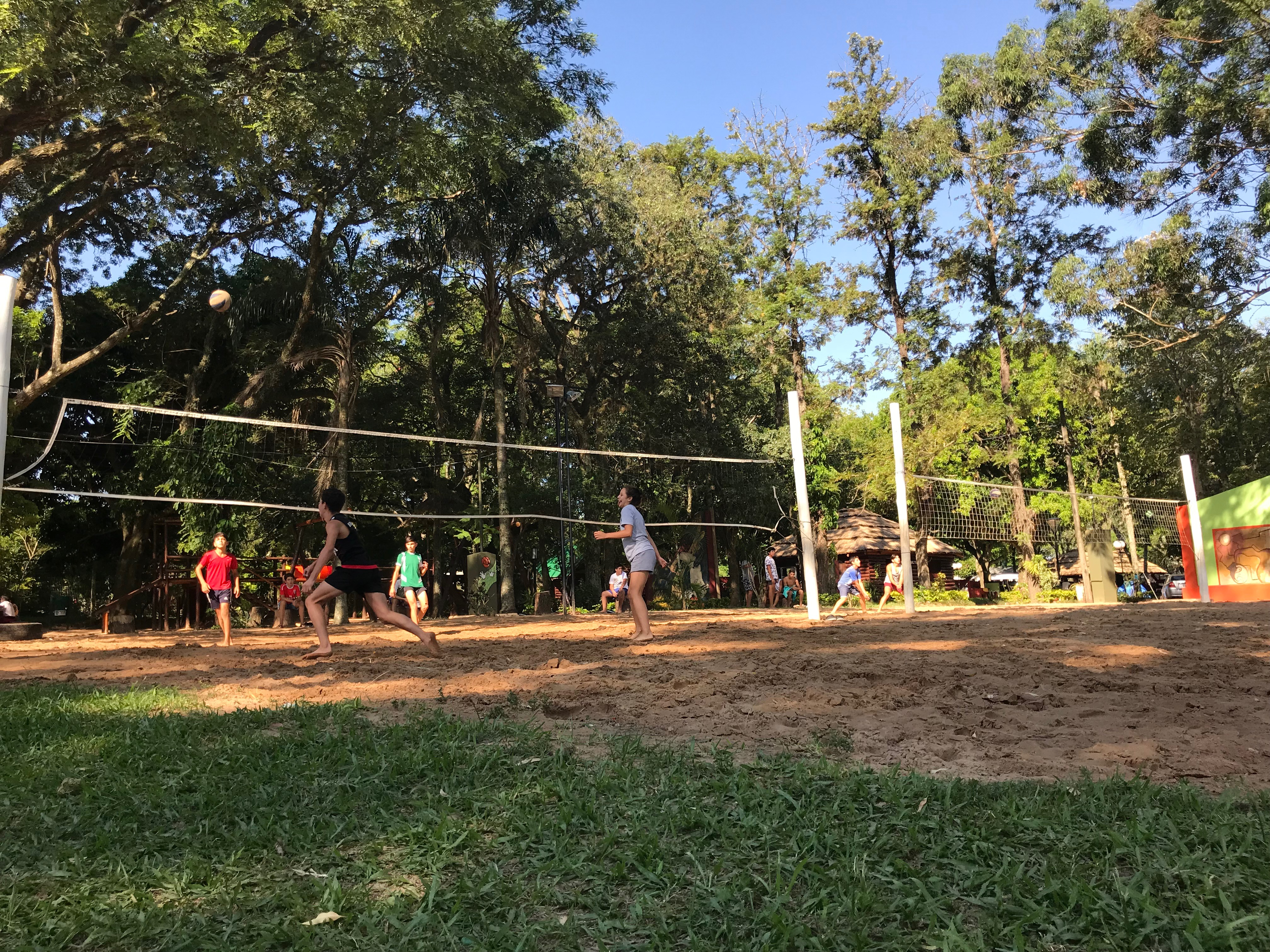 Cancha de voley en el Balneario El Rincón de Caá Catí.